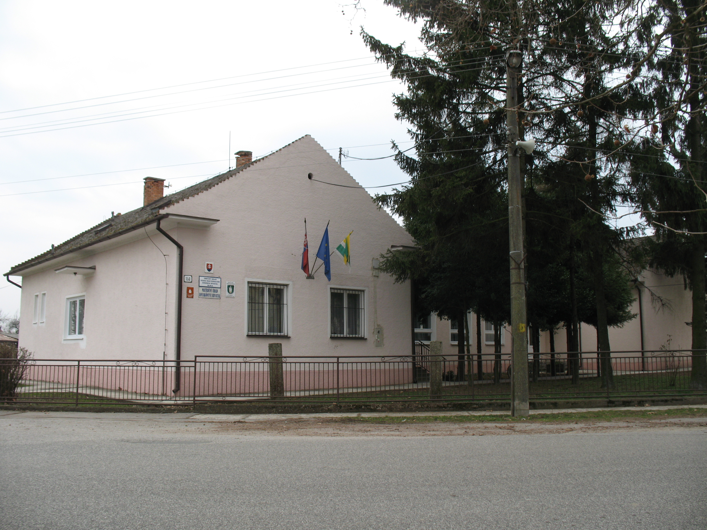 Vajka